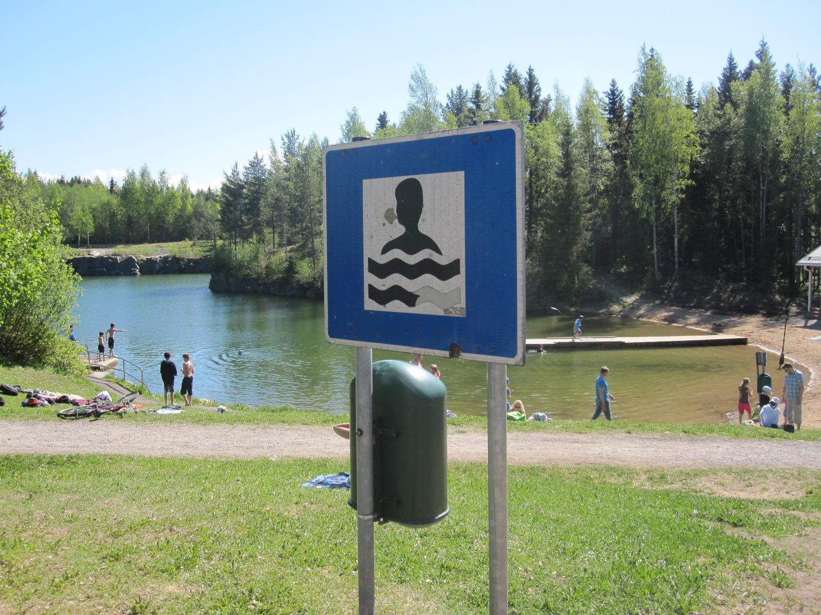 Kempeleessä Ouluntullin alueella sijaitseva uimaranta Kalliomonttu.